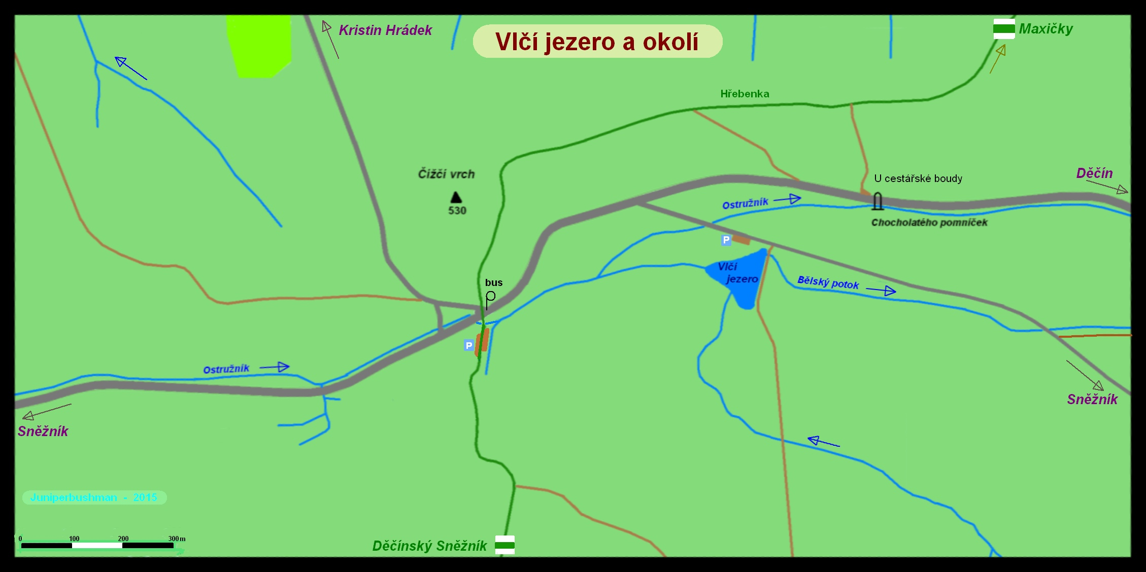 Mapa okolí Vlčího jezera